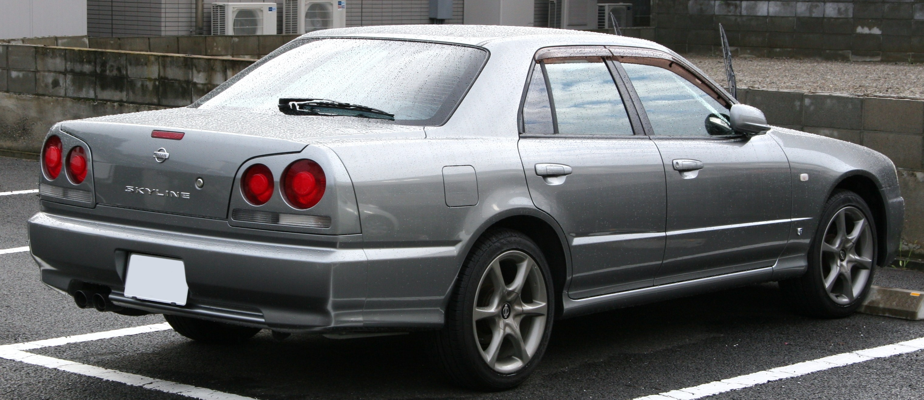 Nissan Skyline